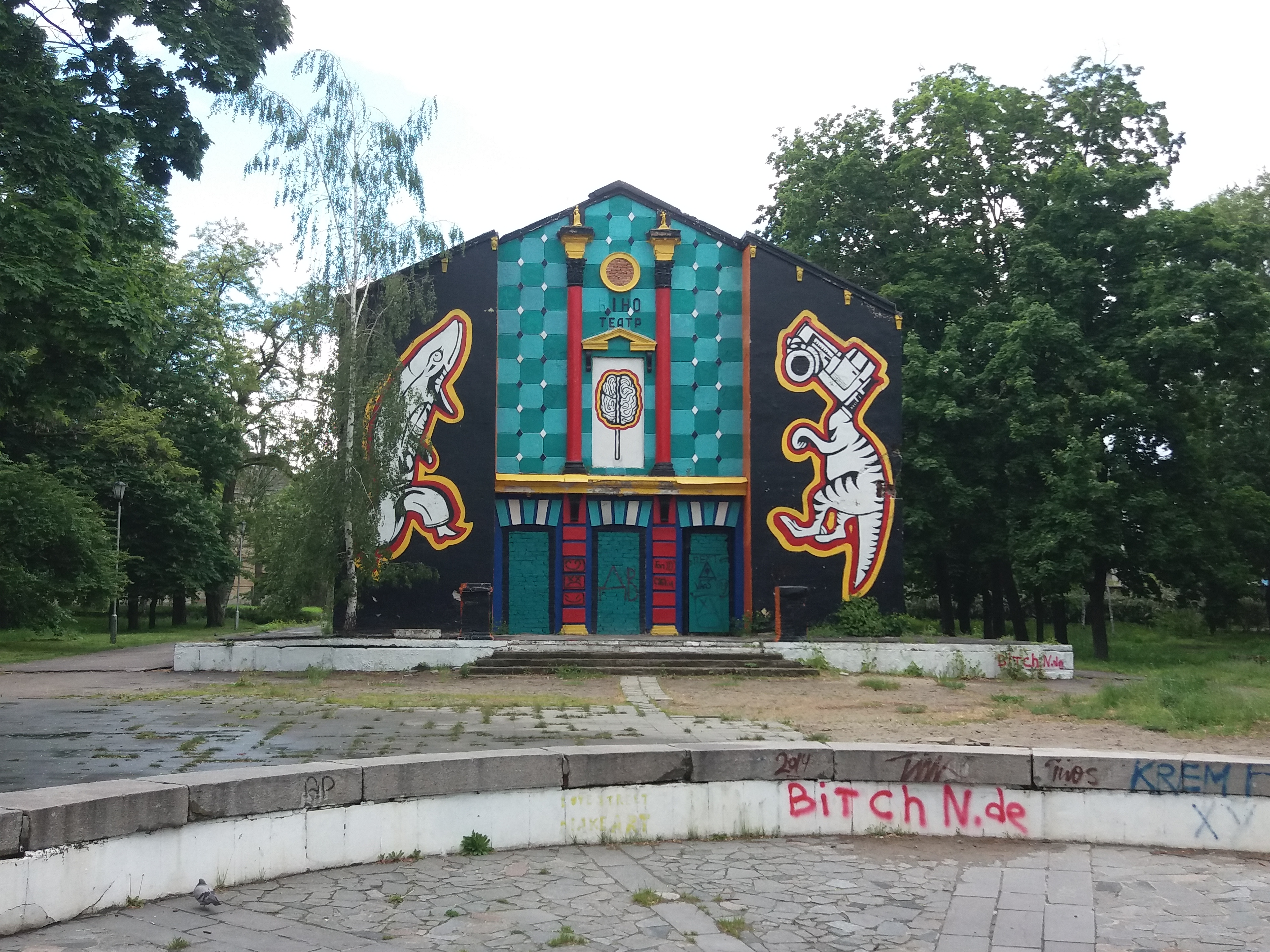 Придніпровський, м. Кременчук, набережна Дніпра